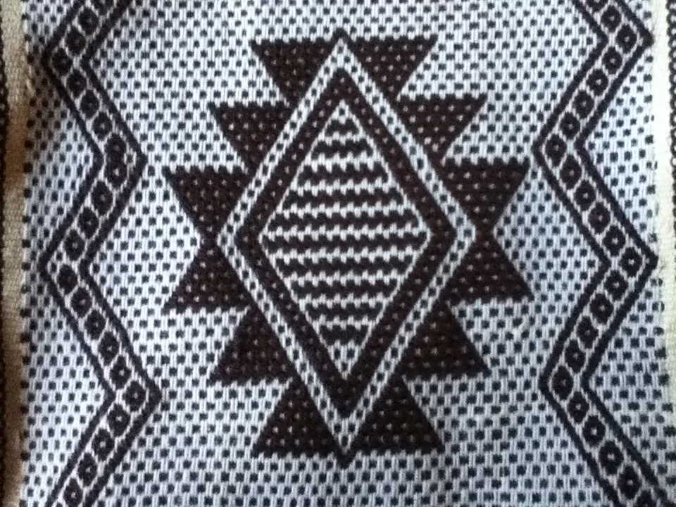 Tejido chiriguanae izoceño. Santa Cruz, Bolivia.